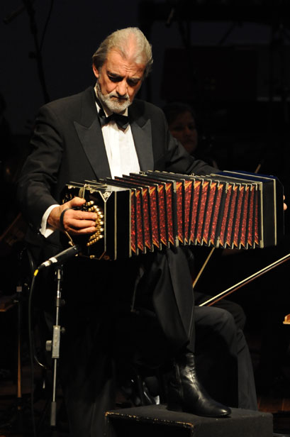 Jazz Sinfônica e Rodolfo Mederos. Auditório Ibirapuera. São Paulo. Brasil. 12/06/2009.